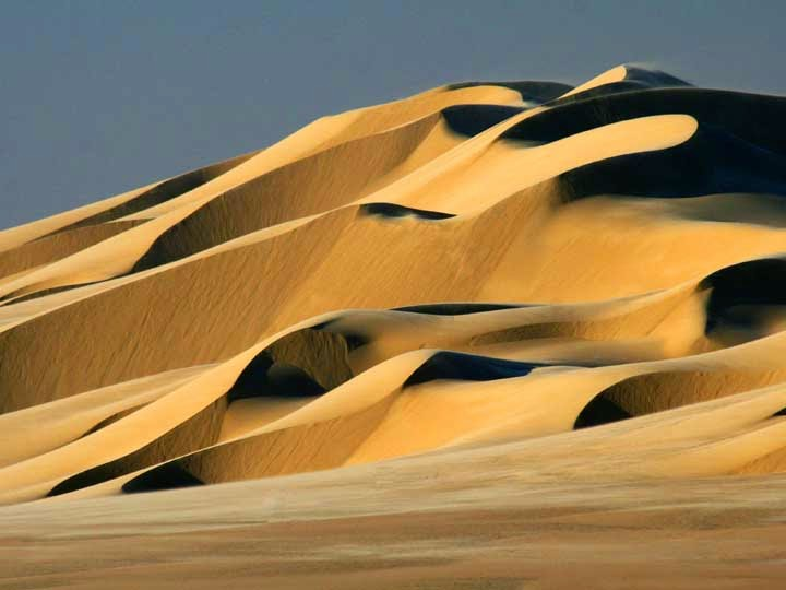 الكثبان الرملية فى الصحراء الليبية